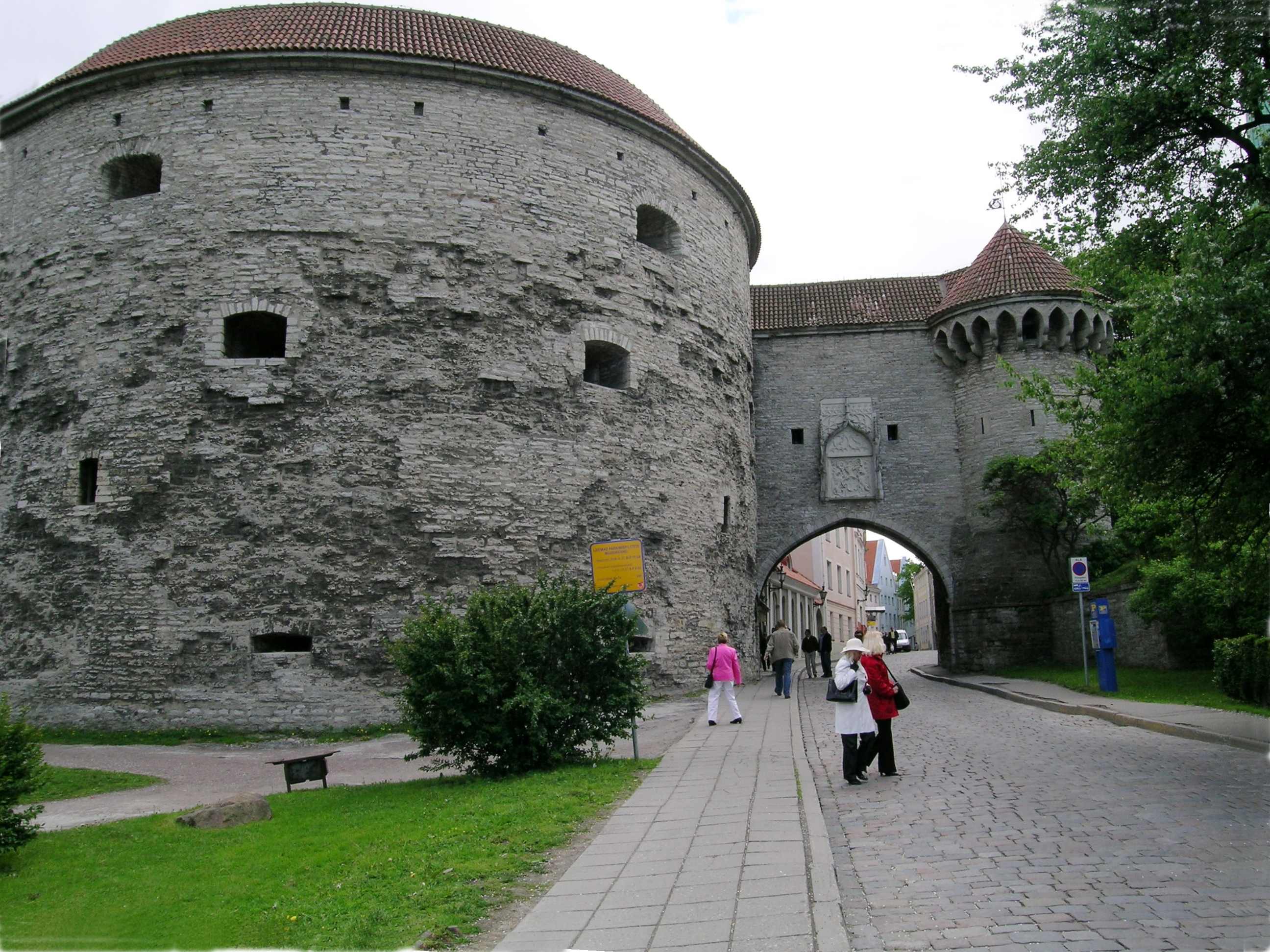 Kanonenturm "Dicke Margarethe" in Tallinn